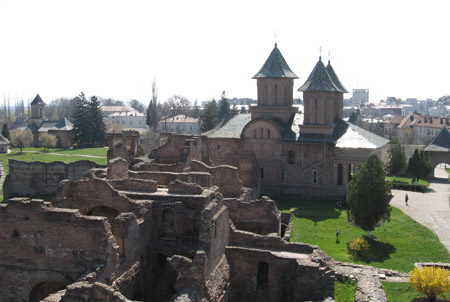 Vue du haut de la tour de Chindia en direction de Curții Domnești.